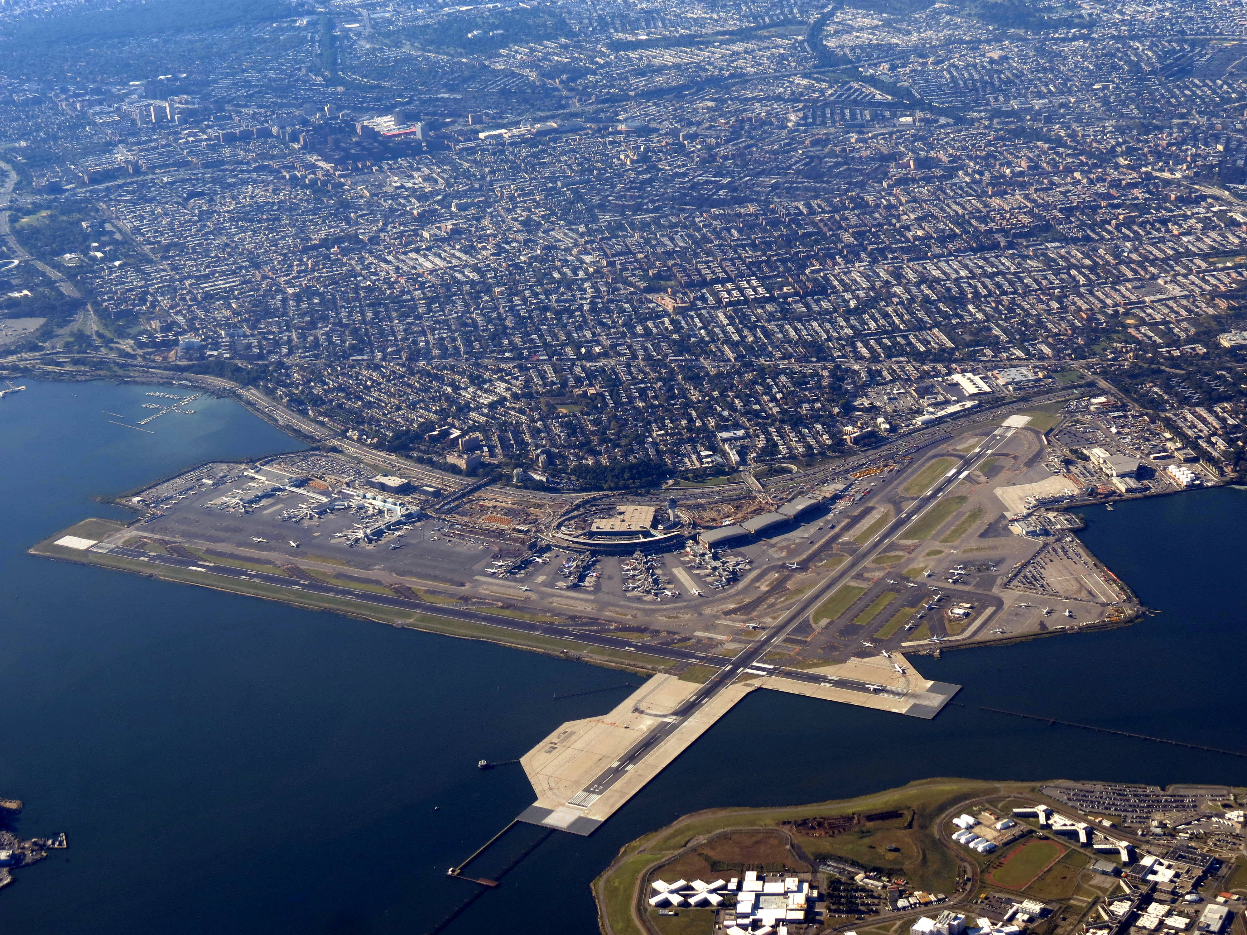 LaGuardia Airport